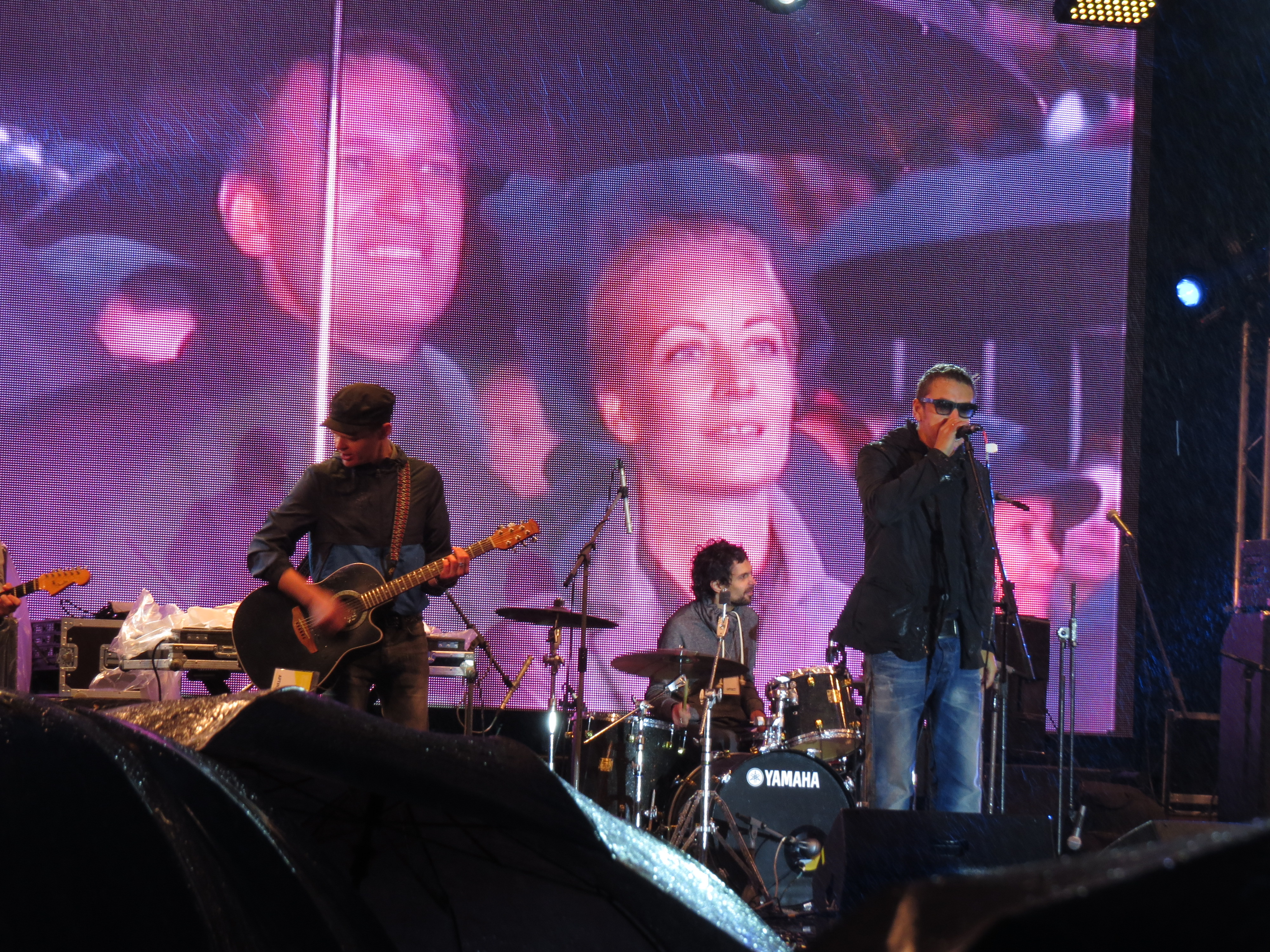 Группа Танцы минус на концерте-митинге в поддержку кандидата в мэры Москвы Алексея Навального на проспекте Сахарова 6 сентября 2013 года